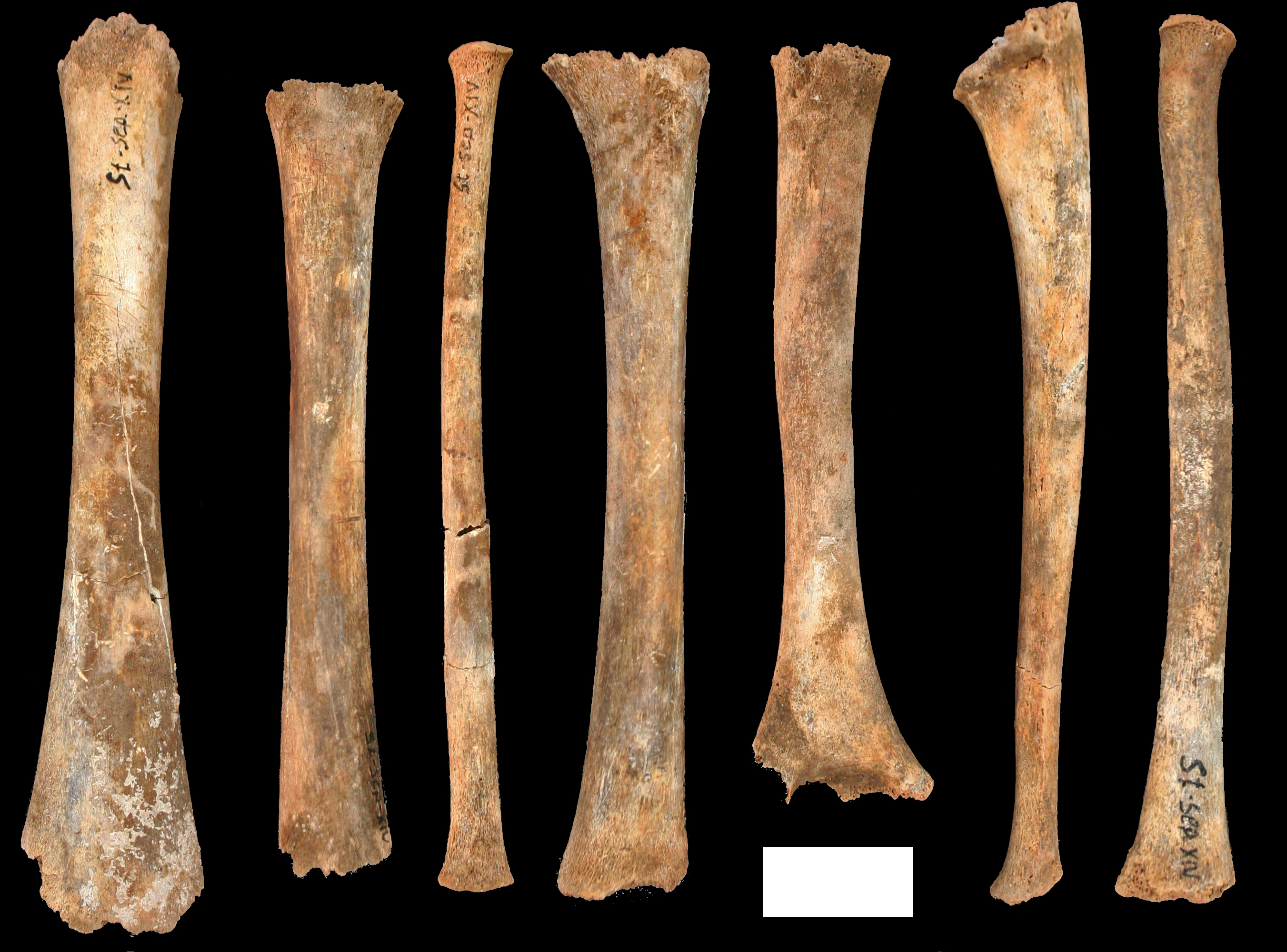 Lapa do Santo - Sepultamento 14. Foto dos ossos longos que faziam parte do fardo que foi encontrado em cima do crânio do indivíduo adulto. Da esquerda para a direita: Fêmur esquerdo, tíbia direita, fíbula direita, tíbia esquerda, úmero direito, ulna esquerda e rádio direito. Os cinco primeiros apresentam tamanho compatível com um indivíduo de cerca de 1 ano de idade e os dois últimos com um indivíduo com cerca de 3 anos de idade. Repare que em vários ossos estão ausentes as extremidades e existem feições potencialmente compatíveis com marcas de mordidas humanas. Esses ossos humanos foram escavados do sítio arqueológico da Lapa do Santo, na região de Lagoa Santa em Minas Gerais, e representam formas sofisticadas de lidar com os mortos. Datação: entre 10 e 8 mil anos atrás.